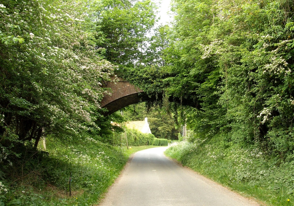 Hameau de La Coete